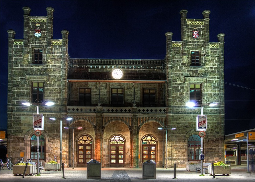 Bahnhof Minden bei Nacht – Der Bahnhof wurde 1848 als Endbahnhof der Köln-Mindener Eisenbahn-Gesellschaft eröffnet und ist im romantischen Baustil errichtet. This is a photograph of an architectural monument.